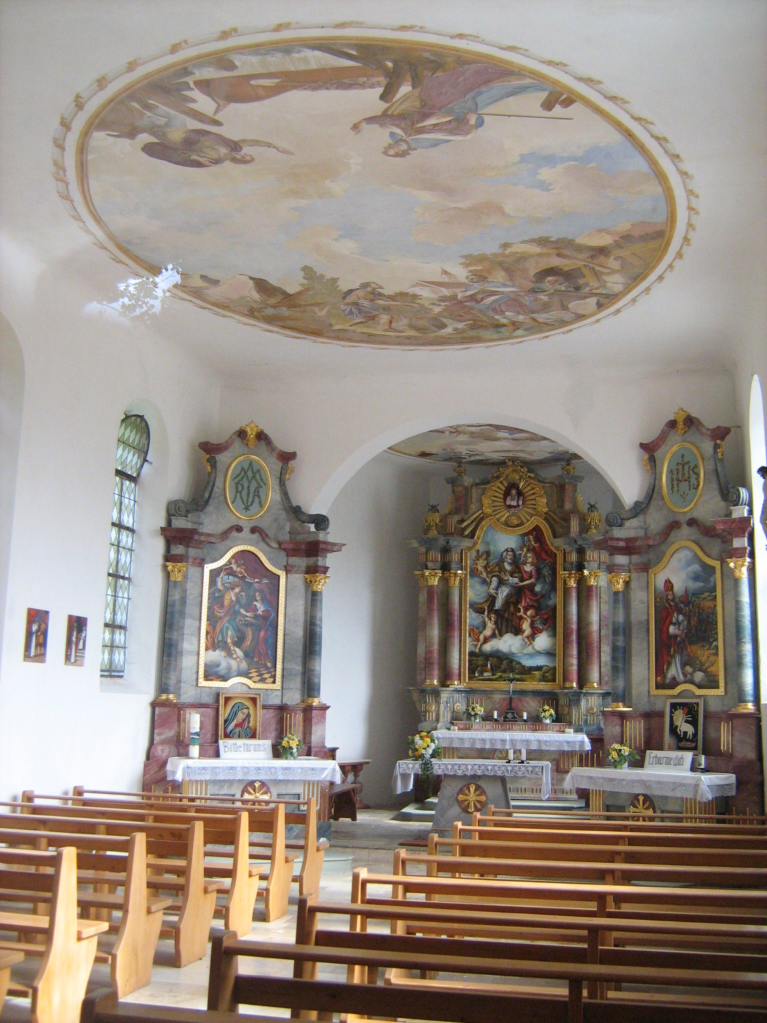 Kath. Wallfahrtskapelle St. Jodok östlich von Haunswies - Gemeinde Affing (Innen-Ansicht)Ende 17. Jh. erbaut, 1730 und 1793 erweitert und umgestaltet; mit Ausstattung; 19?? total ausgeraubt